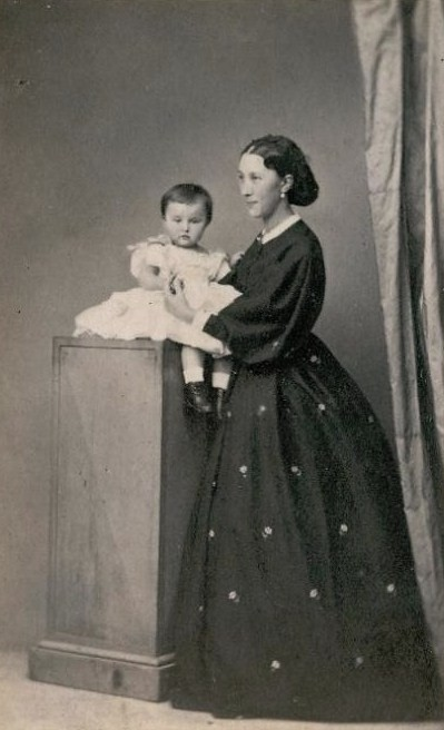 Графиня Варвара Николаевна Гудович, урож. княжна Щербатова (1834—1882)